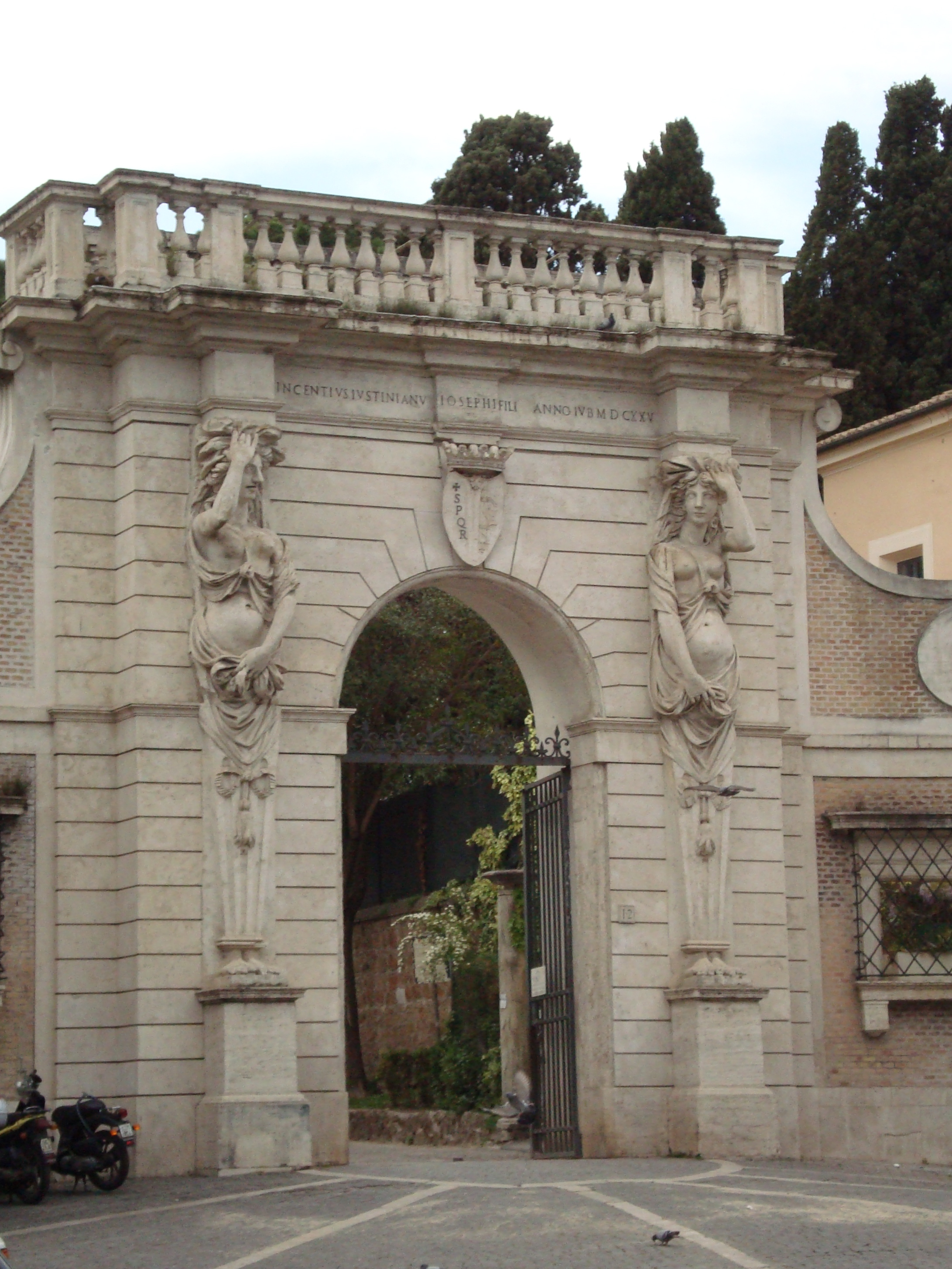 Entrée de la villa Celimontana à Rome